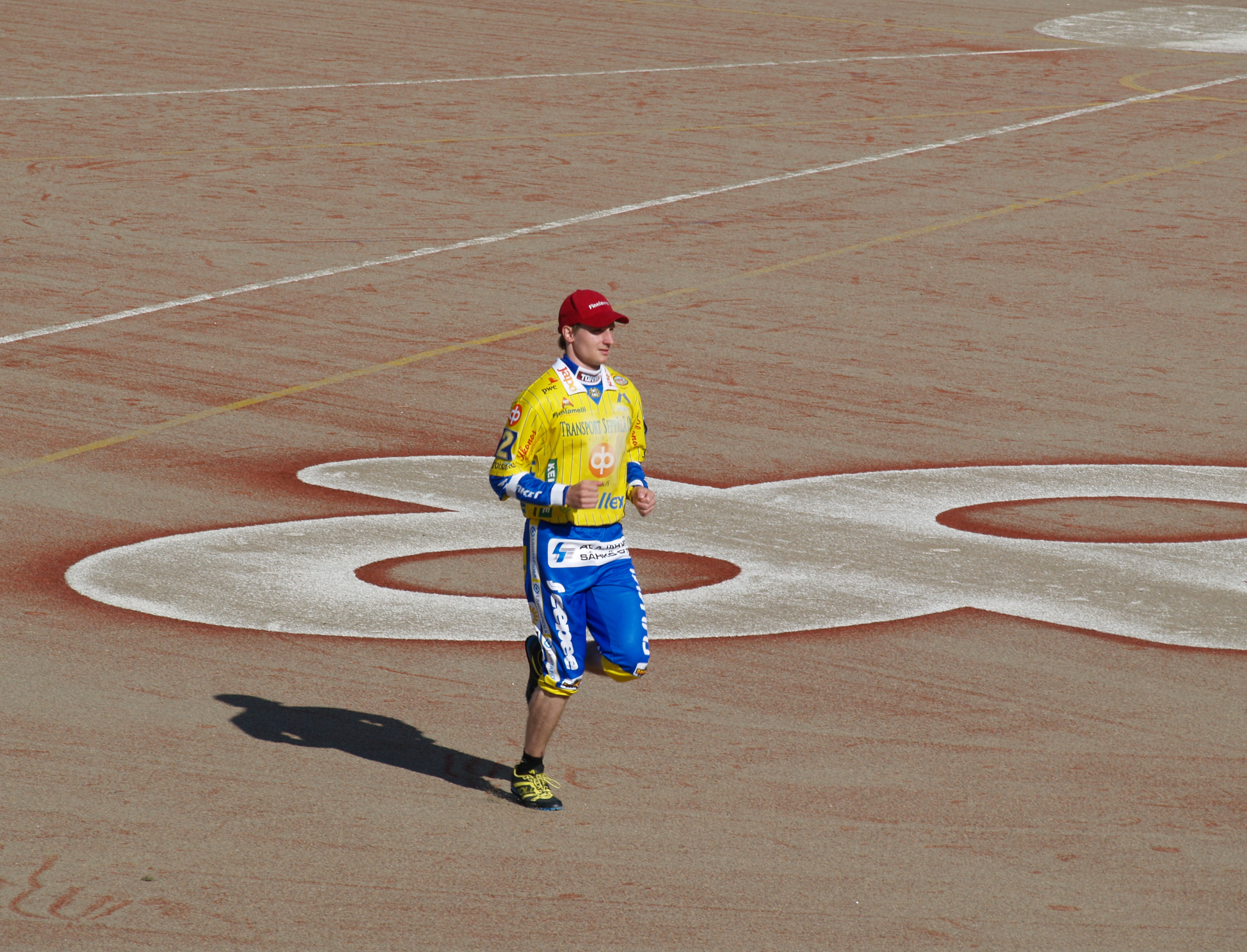 Alajärven Ankkurit - Vimpelin Veto pesäpallo-ottelu 23.6.2015. Kuvassa Jere Saukko.